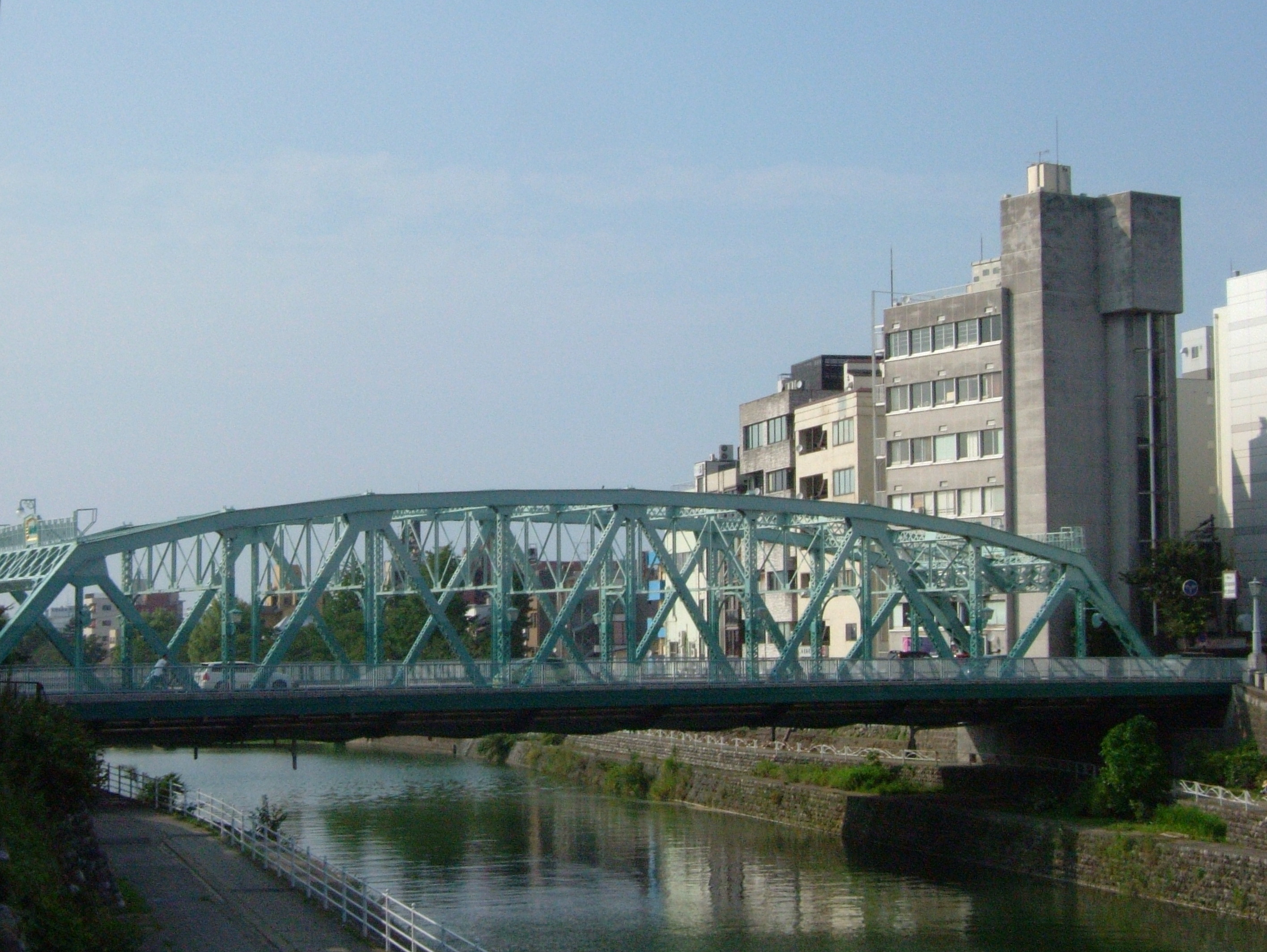 犀川大橋（石川県金沢市）